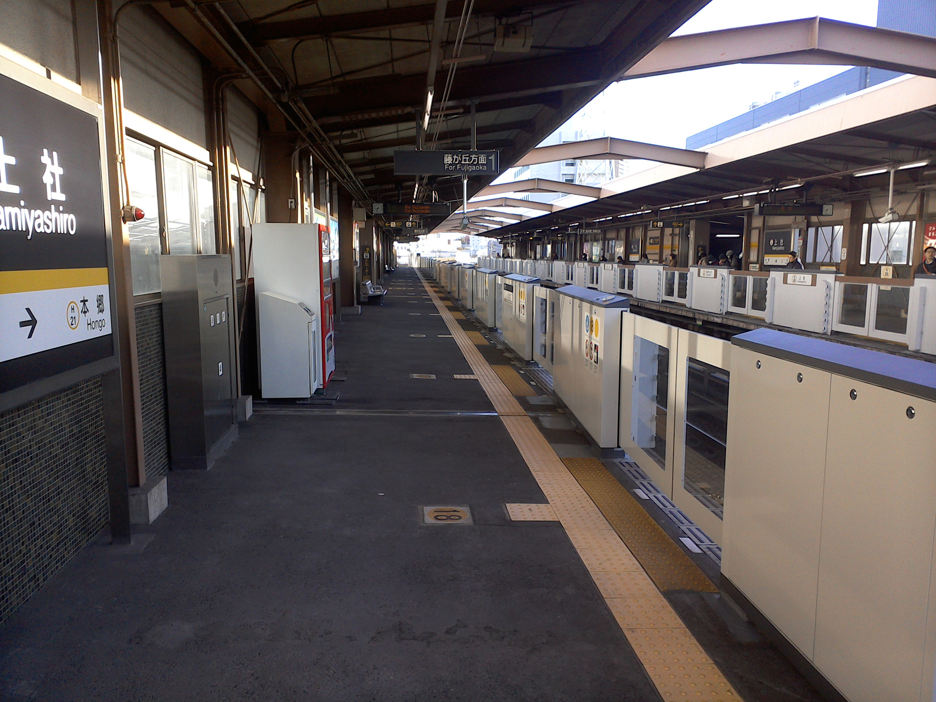 上社駅の2017年現在のホーム。